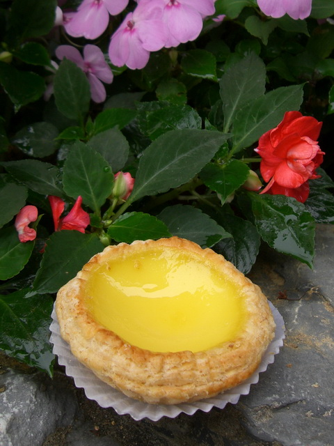 Tartelette chinoise aux oeufs achetée à Hong Kong.